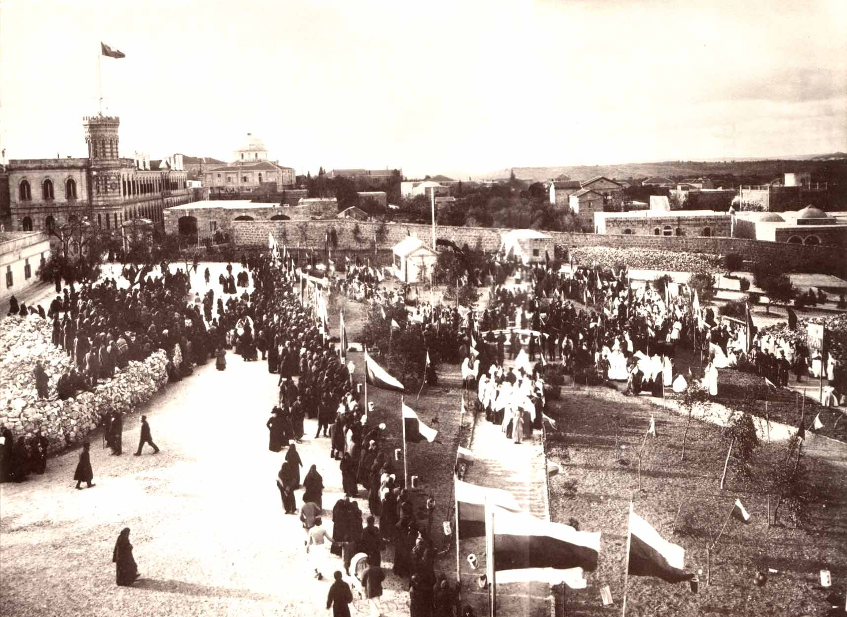 Торжества на Русском подворье в Иерусалиме 1907 г.